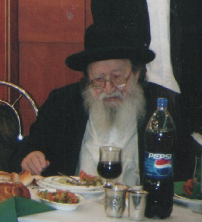 הרב בנימין זילבר